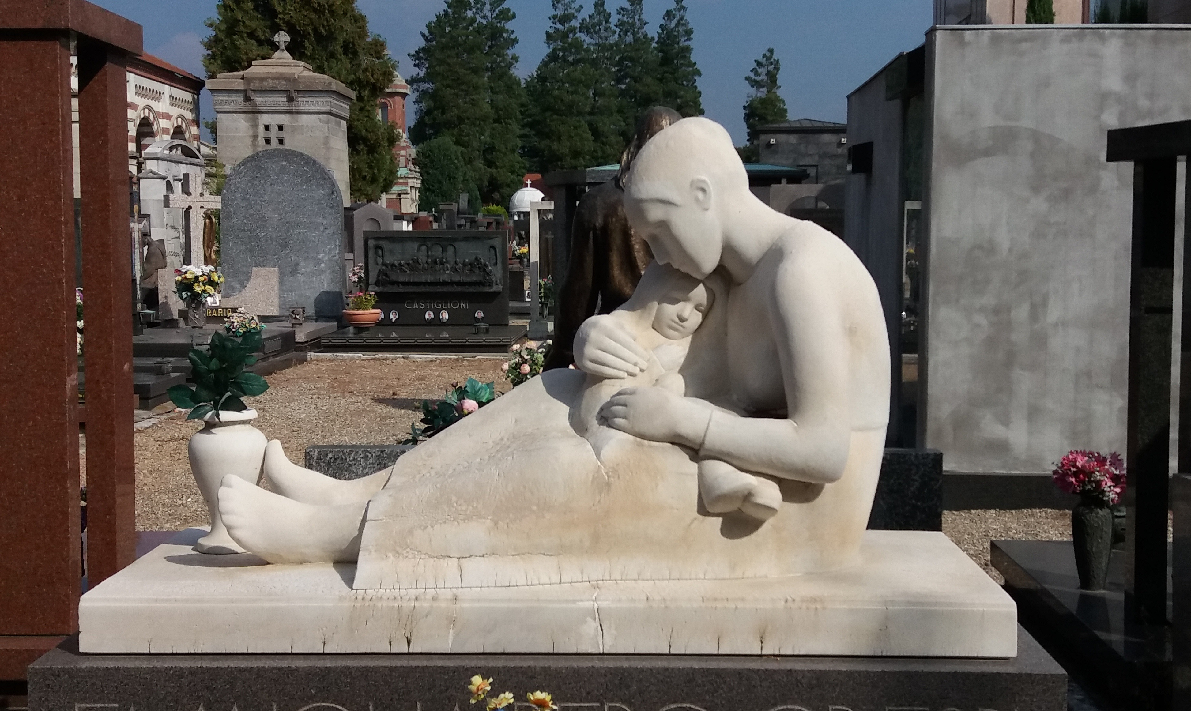 Maternità, opera in marmo di Carrara di Giuseppe Rebesco del 1945, realizzata per la tomba crespi presso il cimitero monumentale di Busto Arsizio This is a photo of a monument which is part of cultural heritage of Italy.